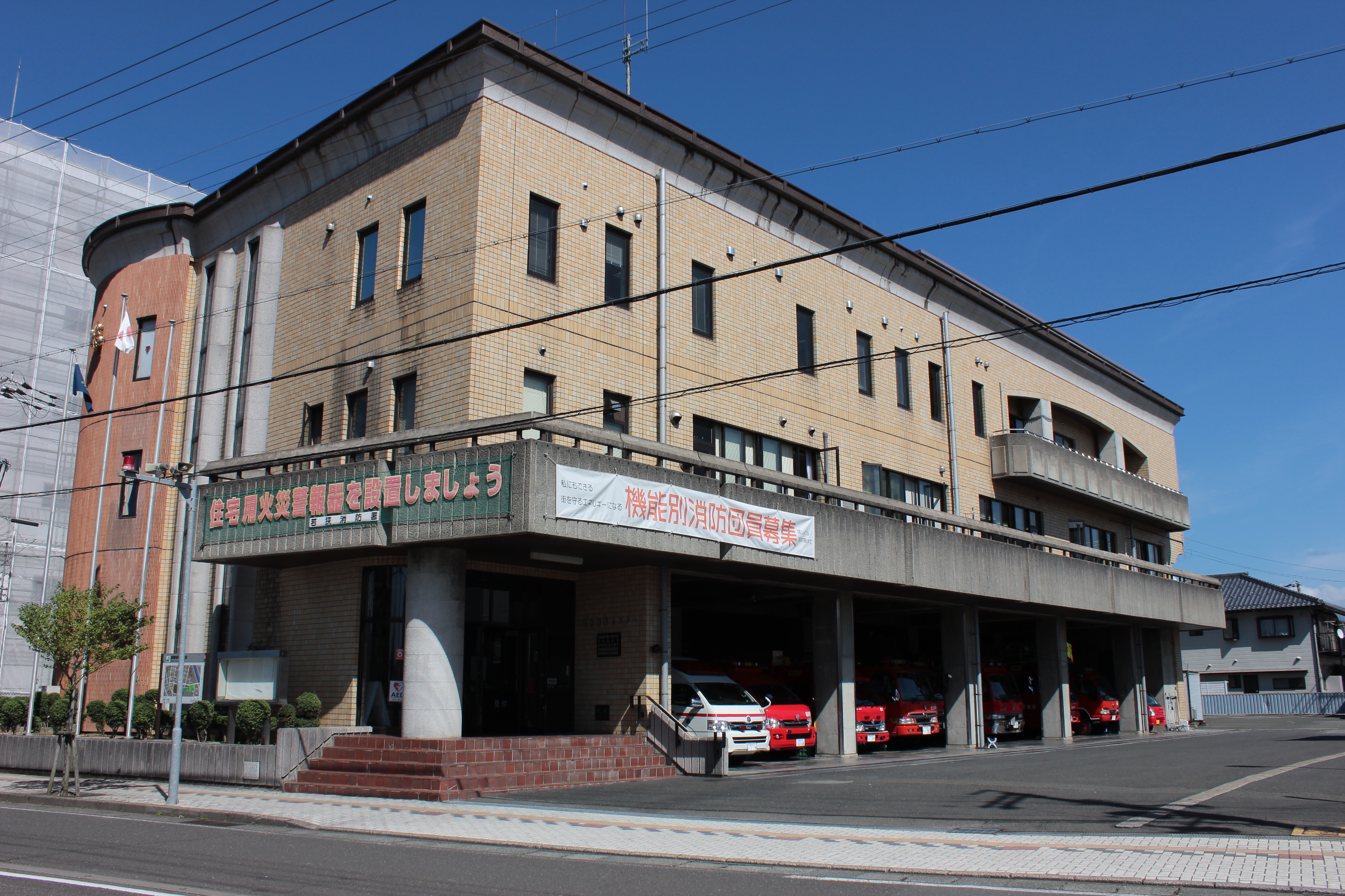 若狭消防組合・若狭消防署（福井県小浜市） Canon EOS Kiss X5